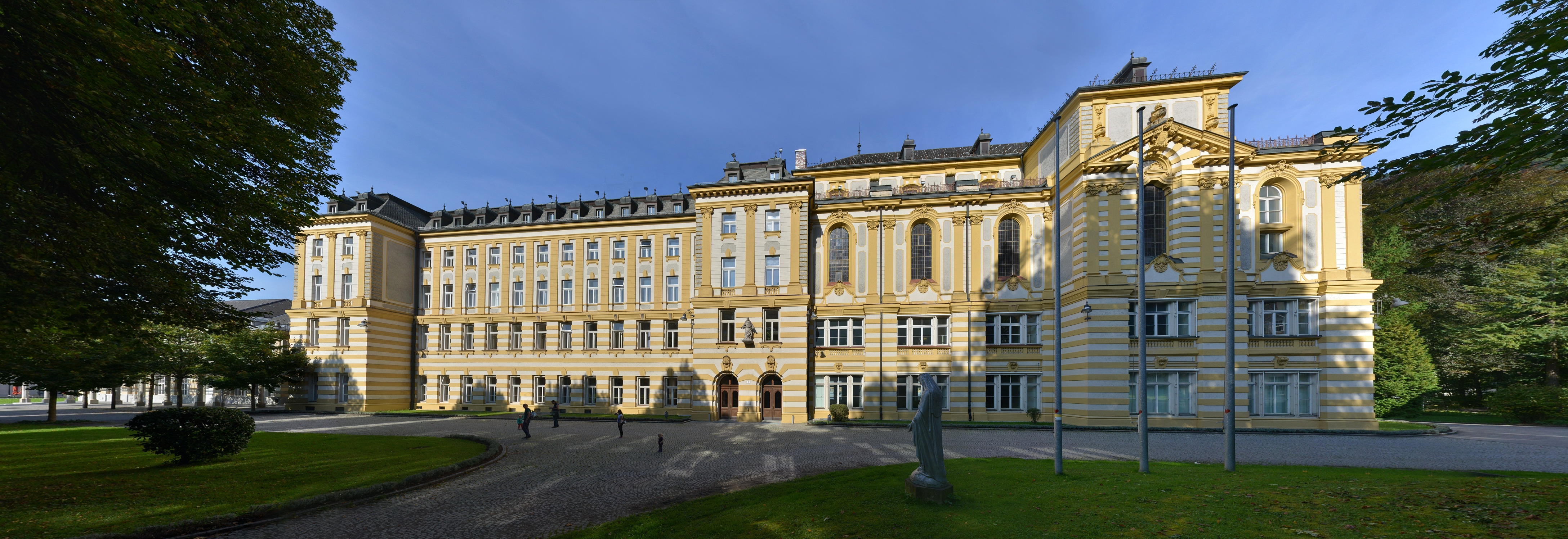 das Stella Matutina, heute Landeskonservatorium wurde 1899 durch Peter Hutter in Feldkirch, Vorarlberg erbaut.